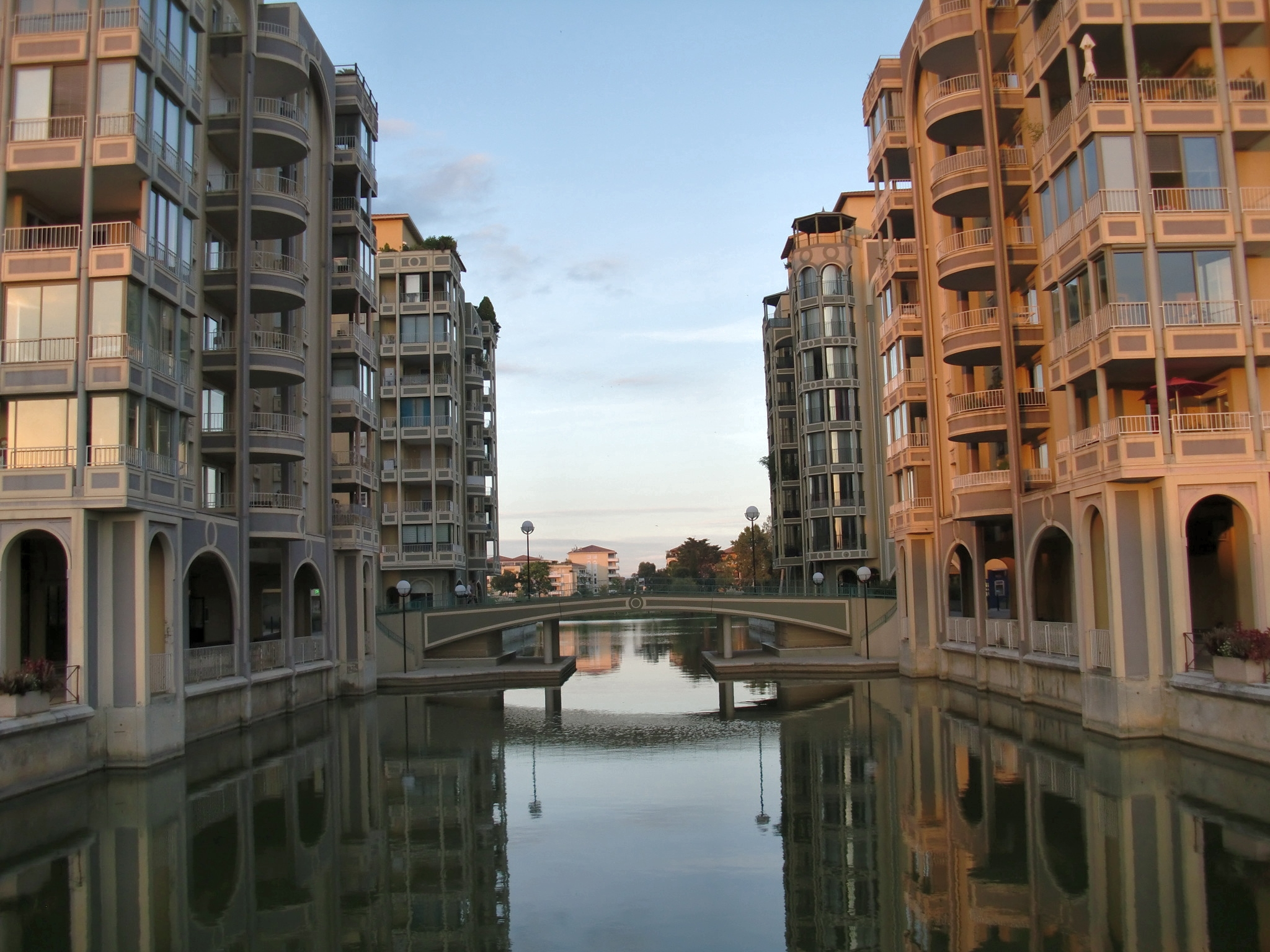 Der Yachthafen Port Ariane in Lattes, Frankreich